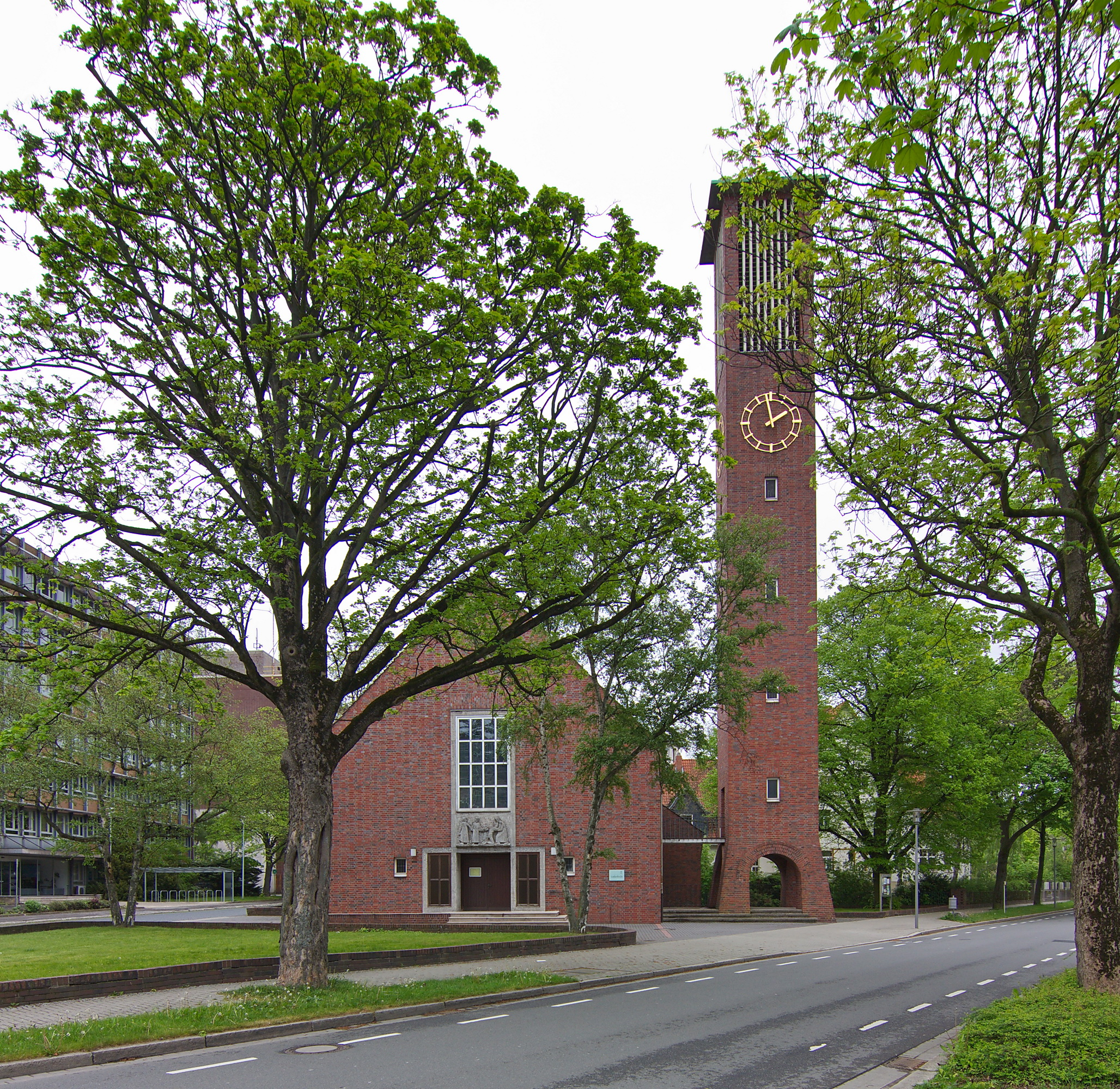 Martin-Luther-Kirche (1955) aus rotem Backstein in Peine, Niedersachsen, Deutschland.